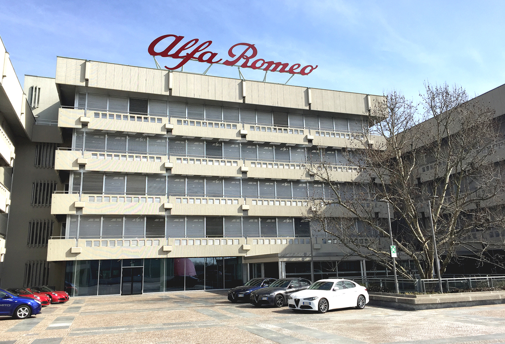 The Alfa Romeo Museum in Arese, Italy